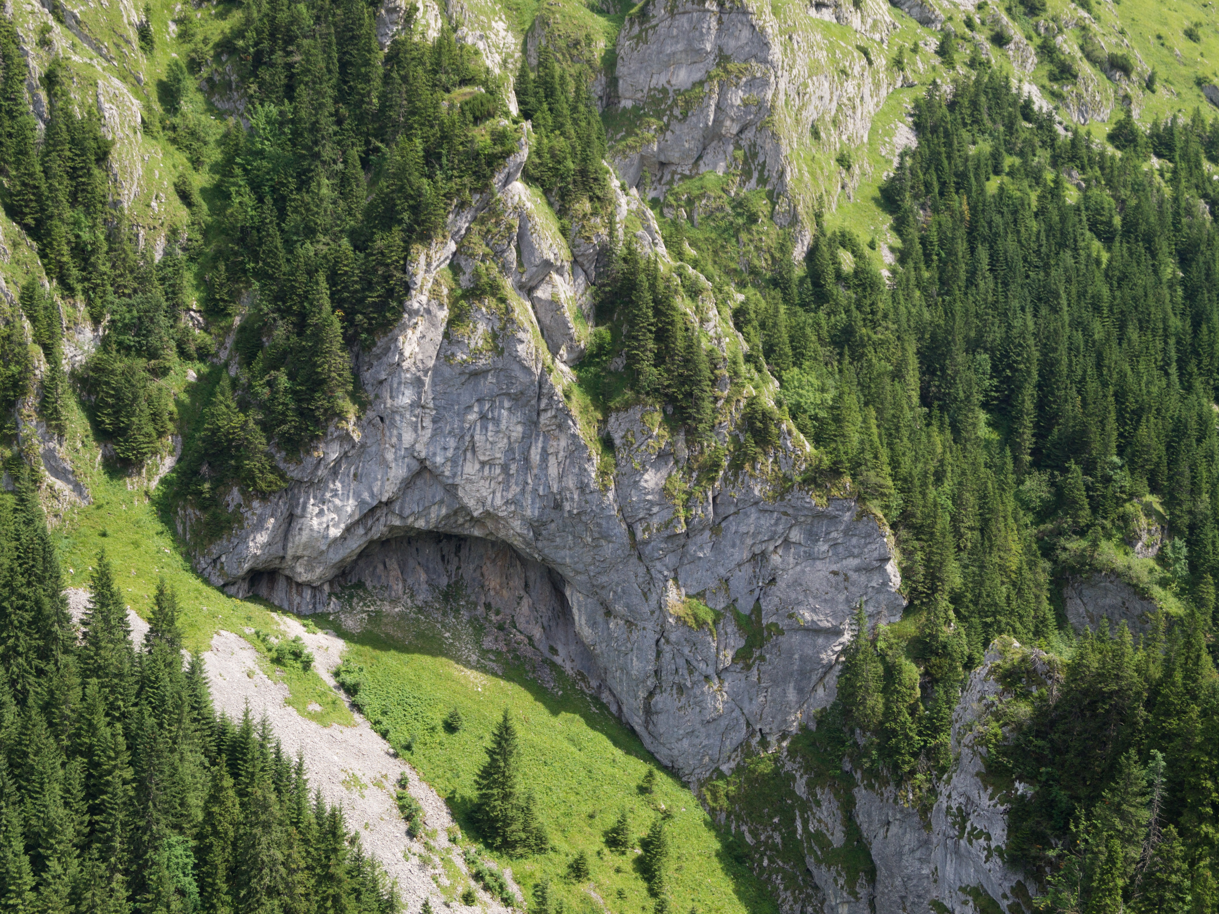 Kościół (z Nyżą ze Świętymi) w Wąwozie Kraków